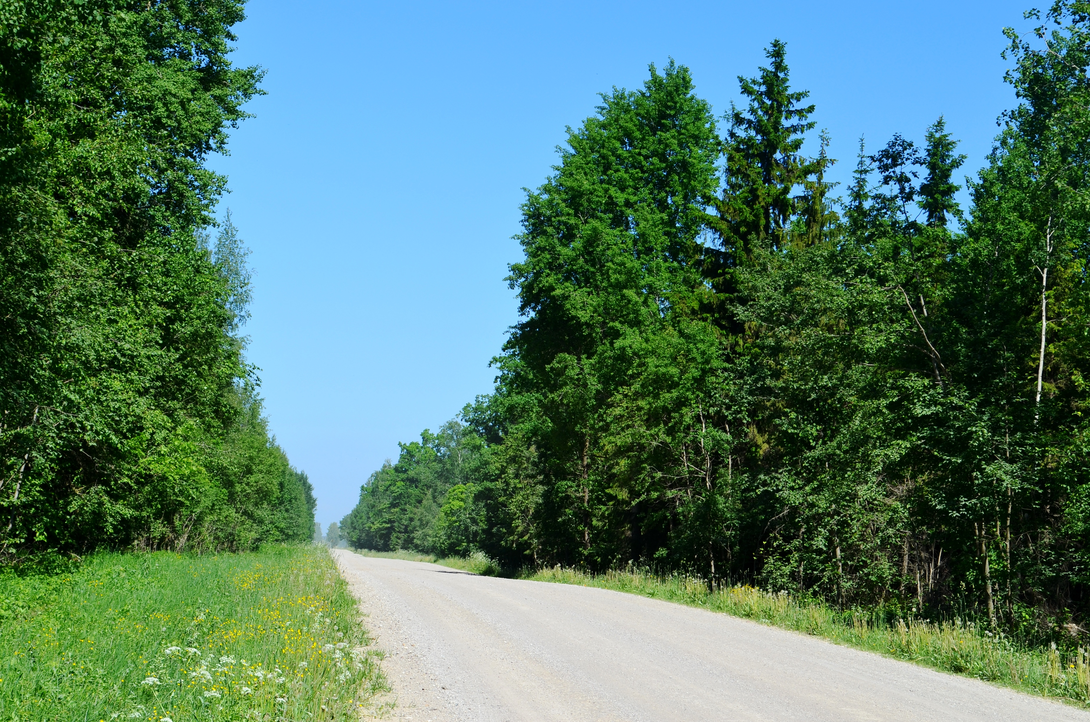 Telišionių miškas, Pakruojo raj.